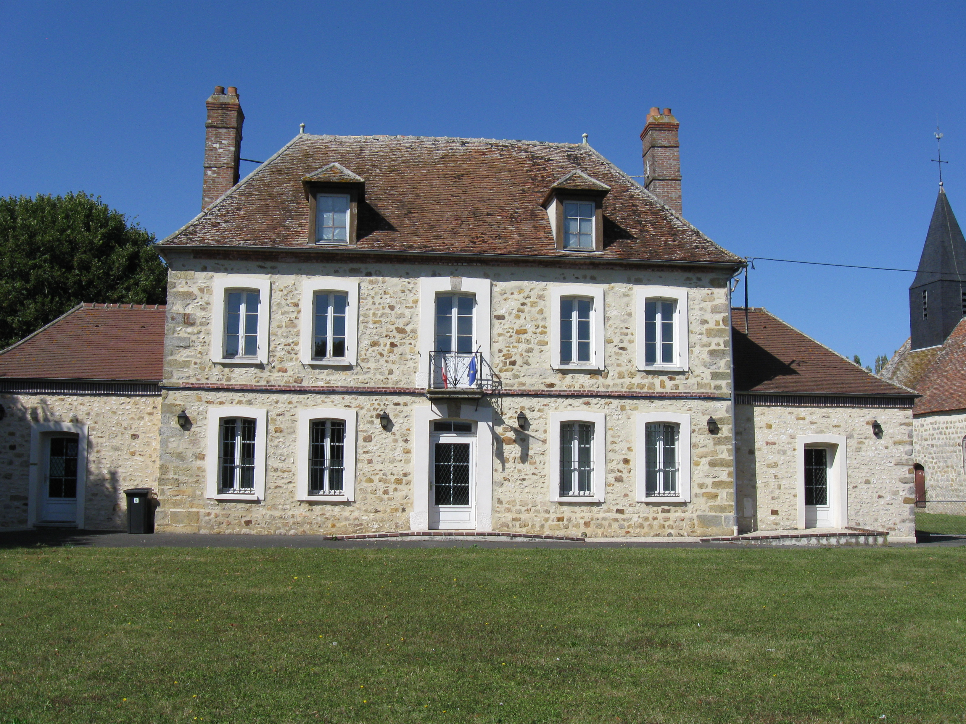 Mairie de Vanvillé. (département de la Seine et Marne, région Île-de-France).